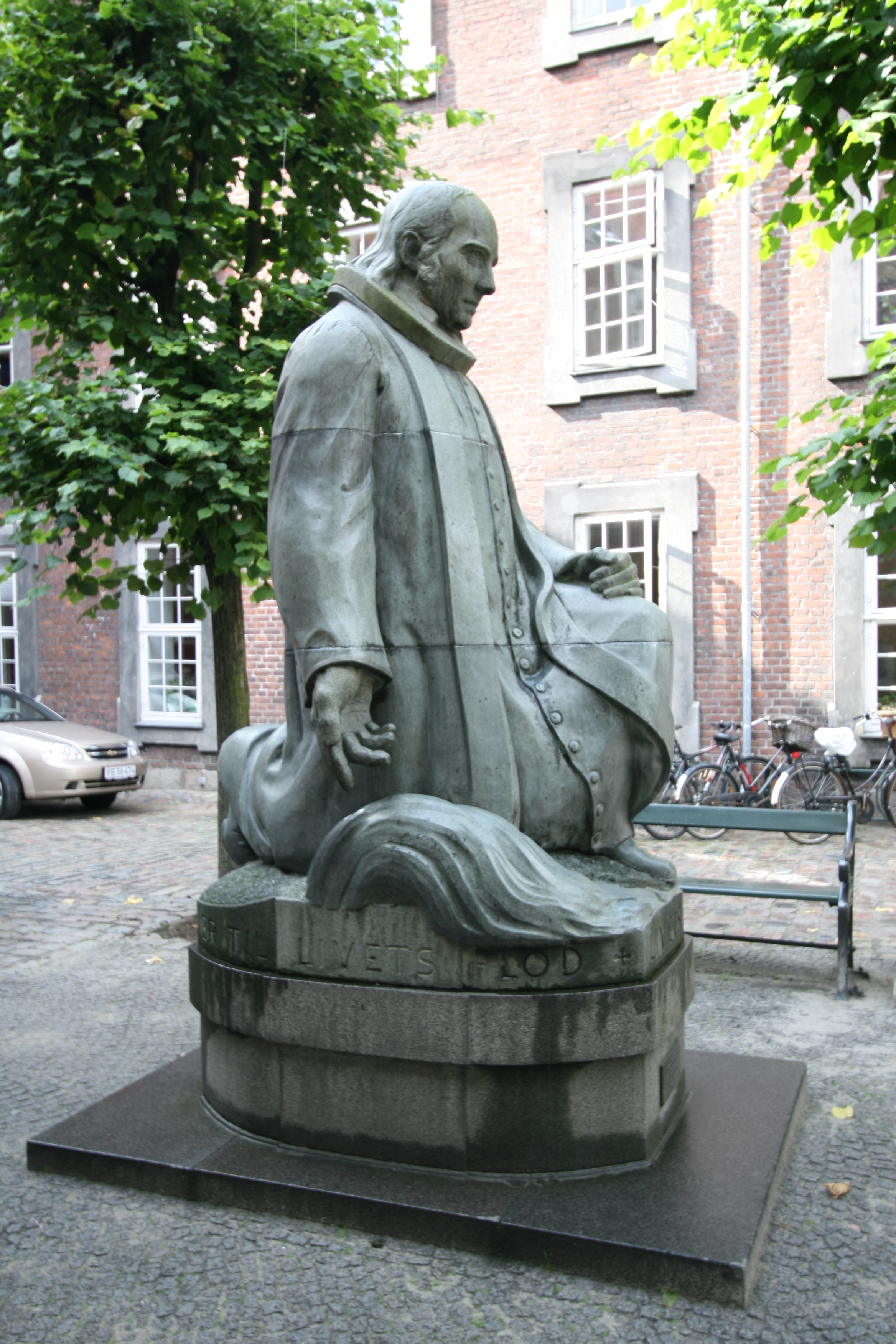 Sculpture of Grundtvig in Vartov, Copenhagen, Denmark. By Niels Skovgaard.